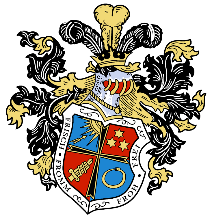 Wappen der CSV! Uttenruthia Erlangen